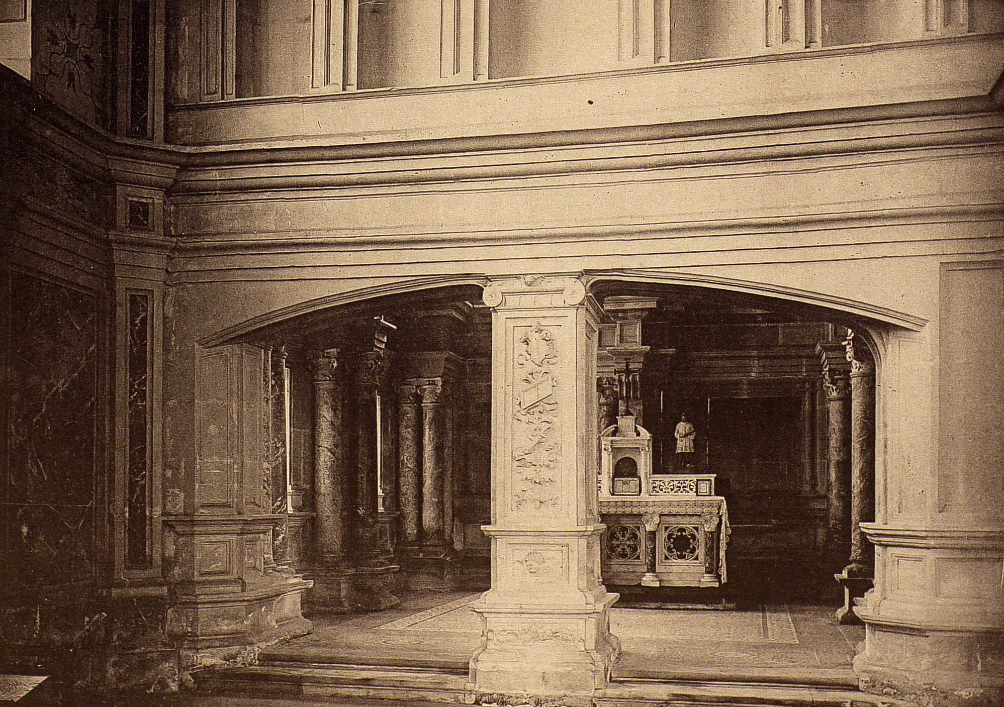 Extrait de La Lorraine artiste du dimanche 10 septembre 1893, fascicule n° 37